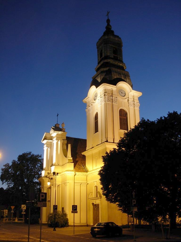 Kościół św. Mikołaja w Bydgoszczy